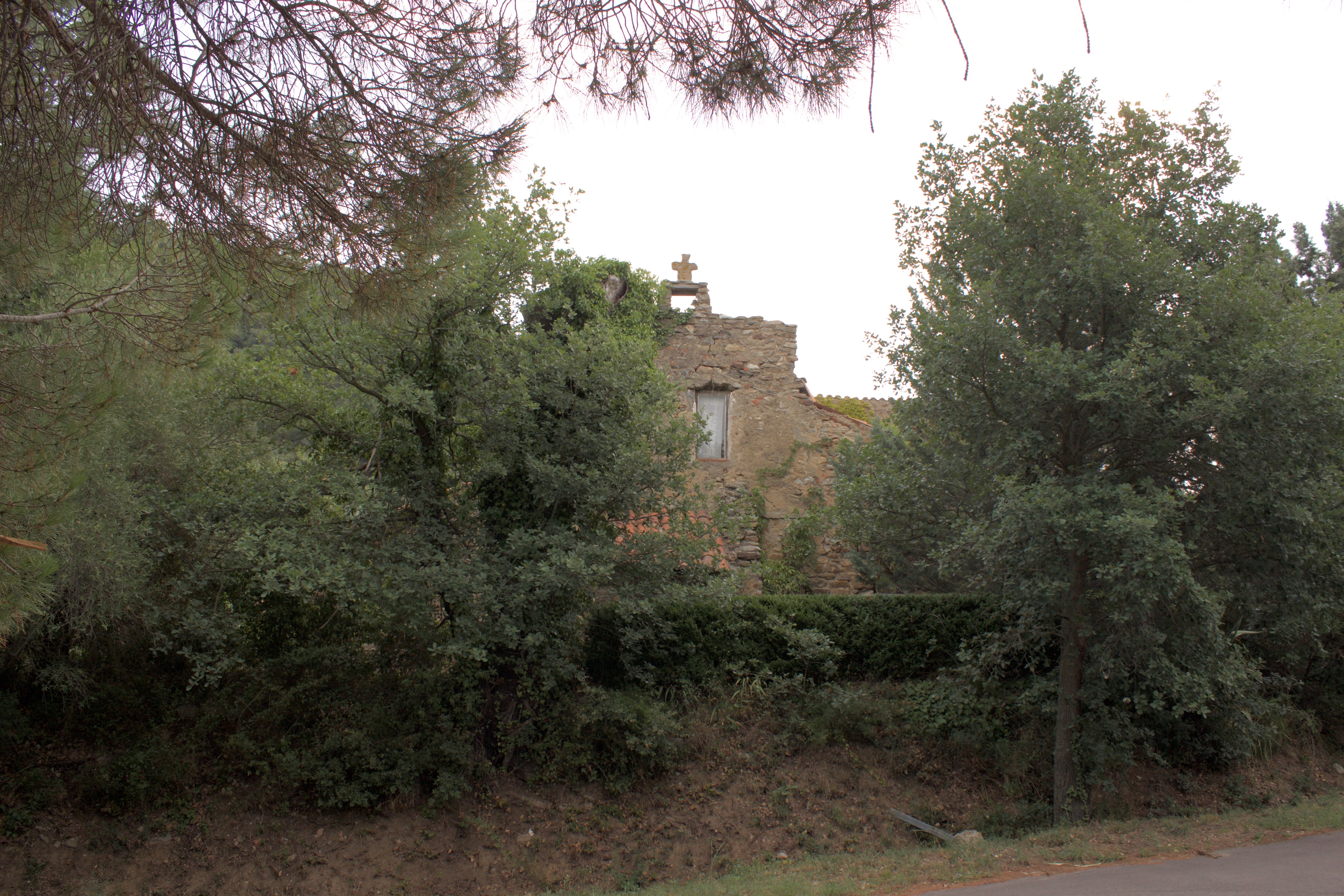 Église Sainte-Marguerite de Molas